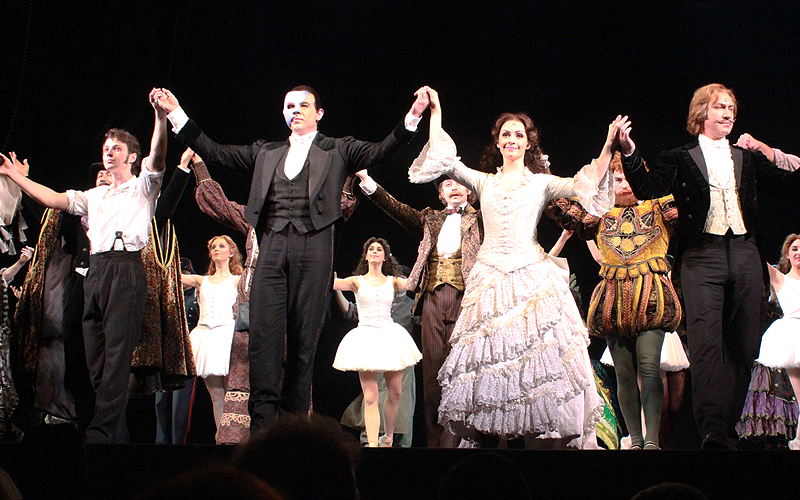 Сцена «Театра МДМ». Артисты мюзикла «Призрак Оперы» на поклоне: Евгений Зайцев (Рауль), Андрей Школдыченко (Призрак Оперы), Тамара Котова (Кристин), Алексей Бобров (мсье Андре).